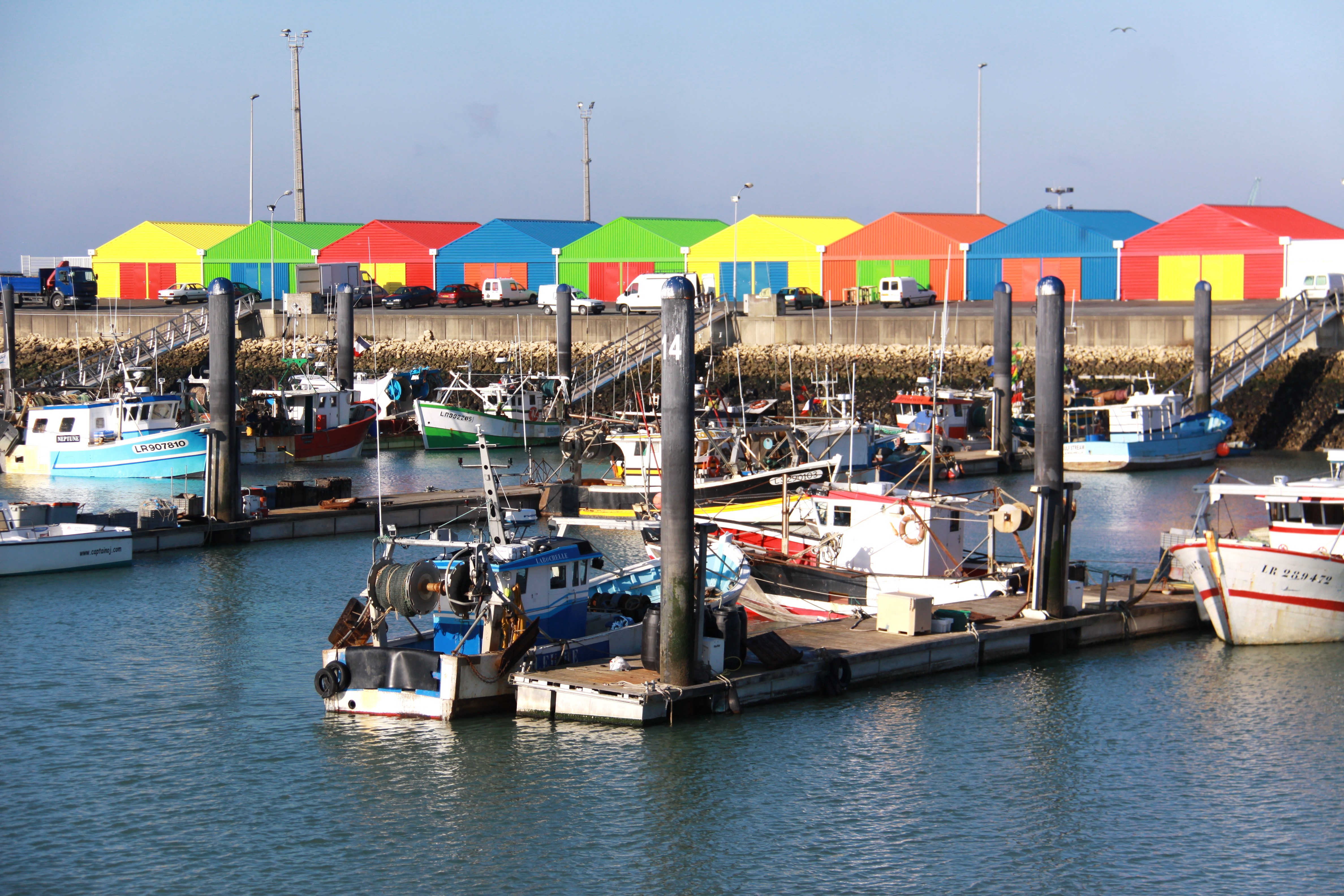 Le Bassin des Coureauleurs du port de pêche de Chef de Baie à marée basse. Ce bassin est réservé aux bateaux de pêche artisanale. Il est accessible à la navigation quel que soit l'état de la marée. A l'arrière plan, les bâtiments de couleurs différentes sont des chais d' armement. Ils servent à certains marins-pêcheurs pour entreposer leur matériel. La Rochelle, Charente Maritime, France